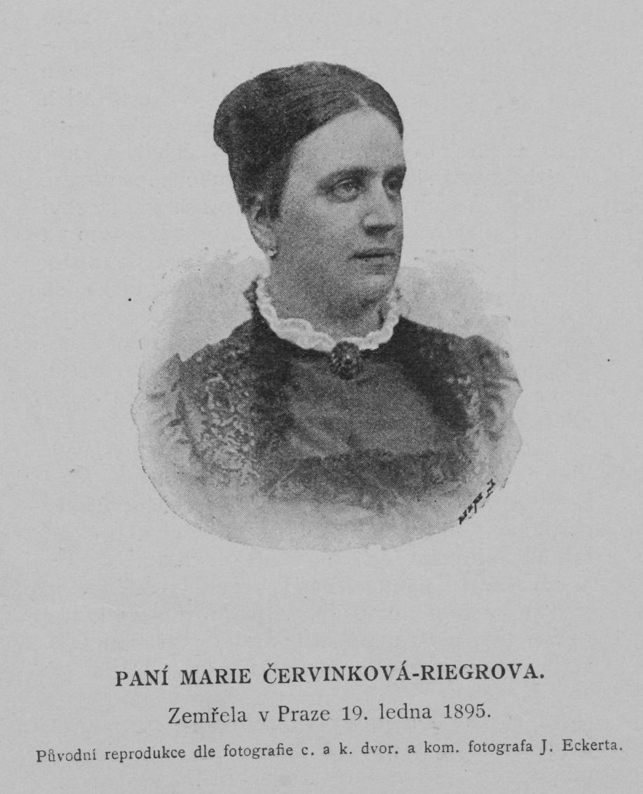 Portrait of Marie Červinková-Riegrová (1854 - 1895), Czech writer, daughter of František Ladislav Rieger.